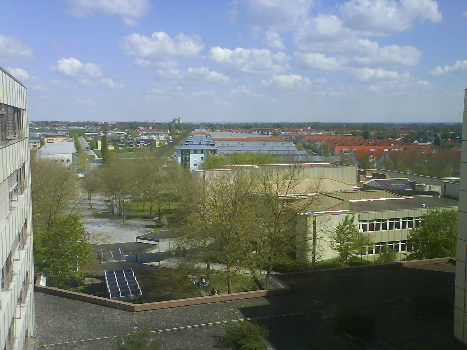 Hollerstauden, Ingolstadt, Germany